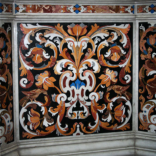 Duomo di Reggio Calabria, Cappella del Santissimo Sacramento, stile barocco, particolare del basamento